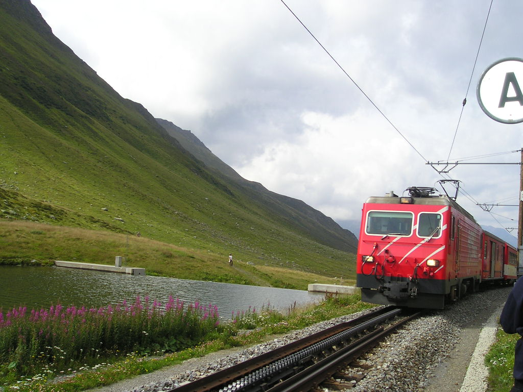 před sedlem Oberalppass